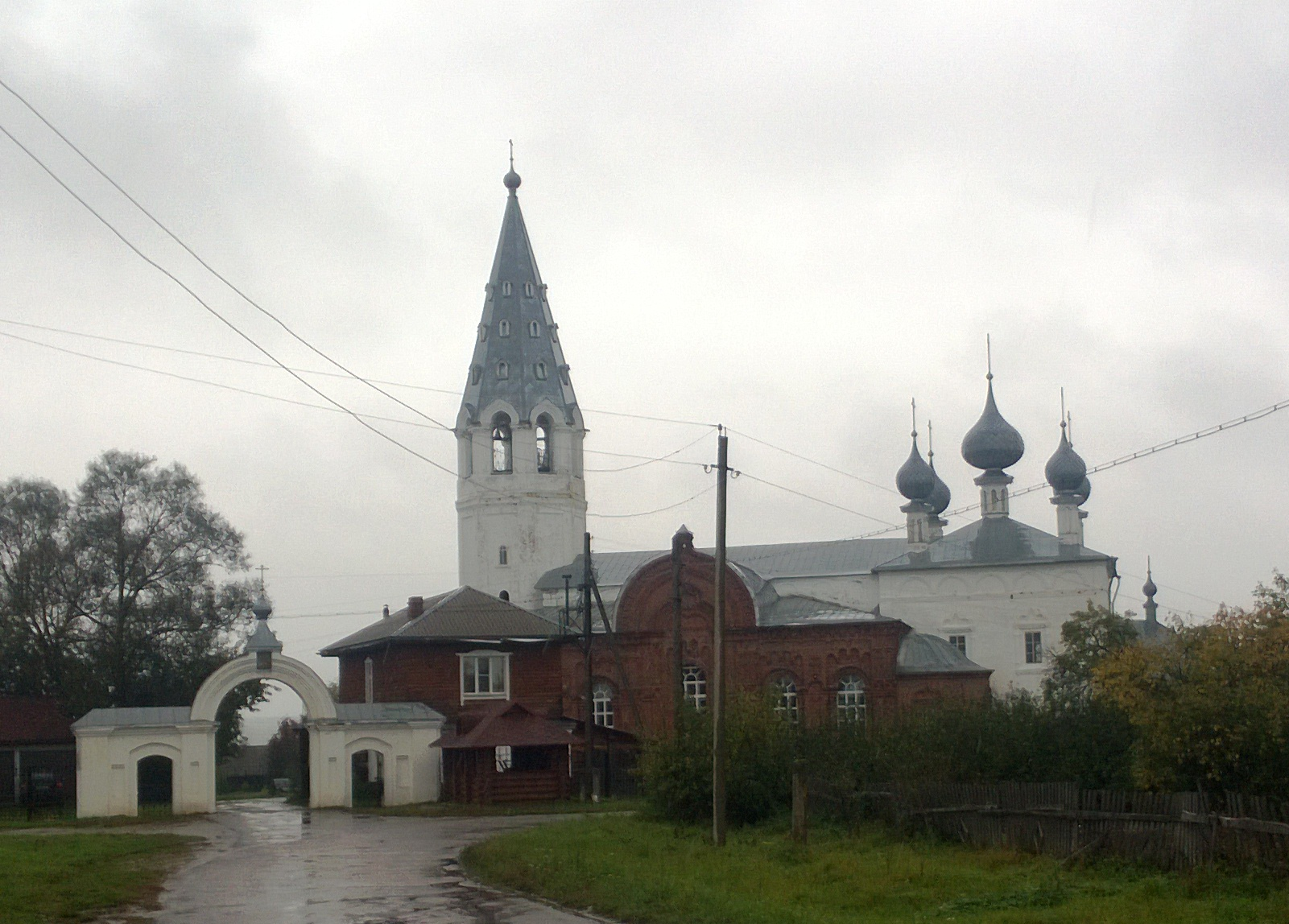 Церковь Воскресенская: Ивановская область, Юрьевецкий район, село Ёлнать